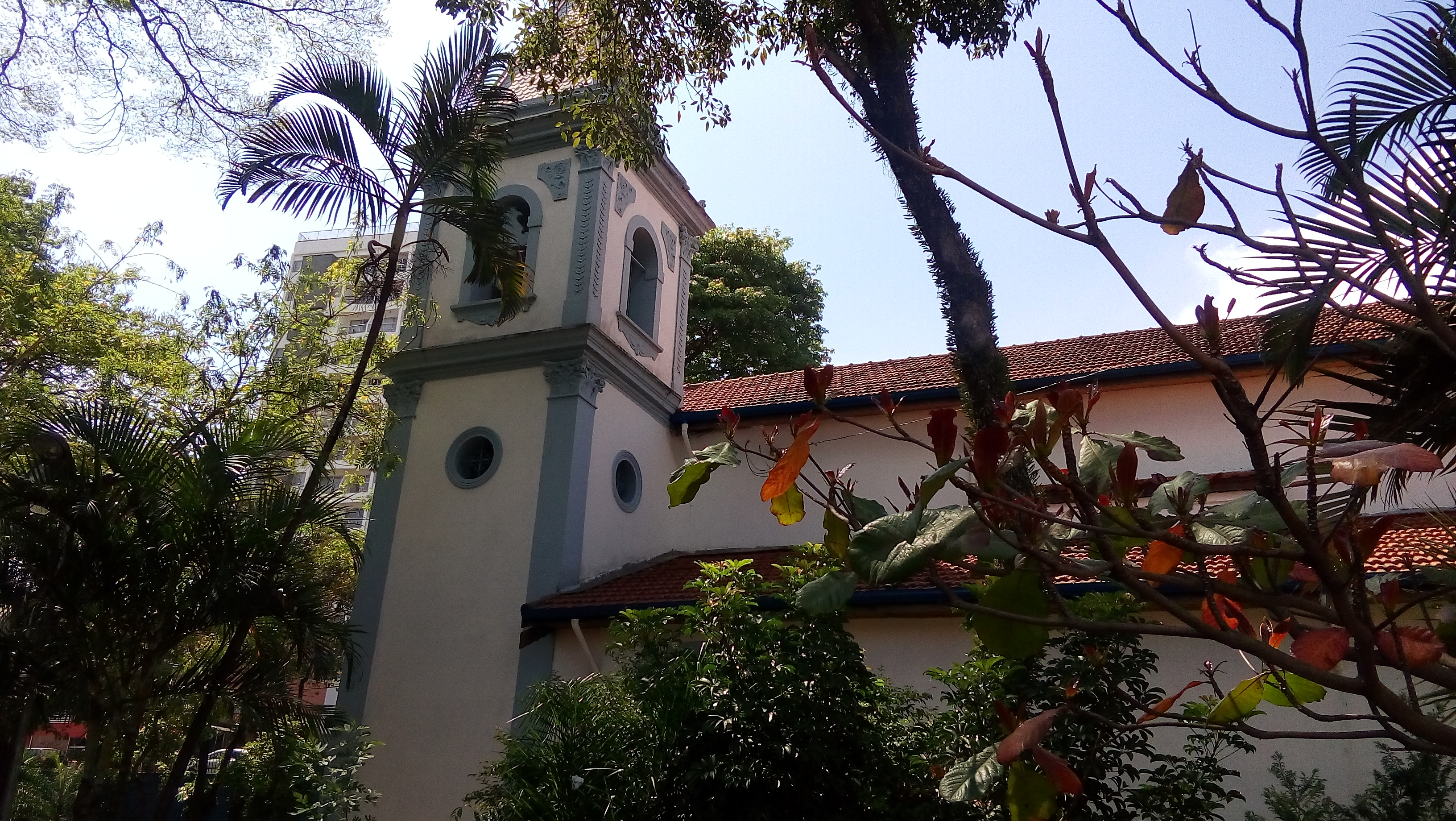 Torre da Igreja do Rosário dos Homens Pretos da Penha, em São Paulo (SP), Brasil